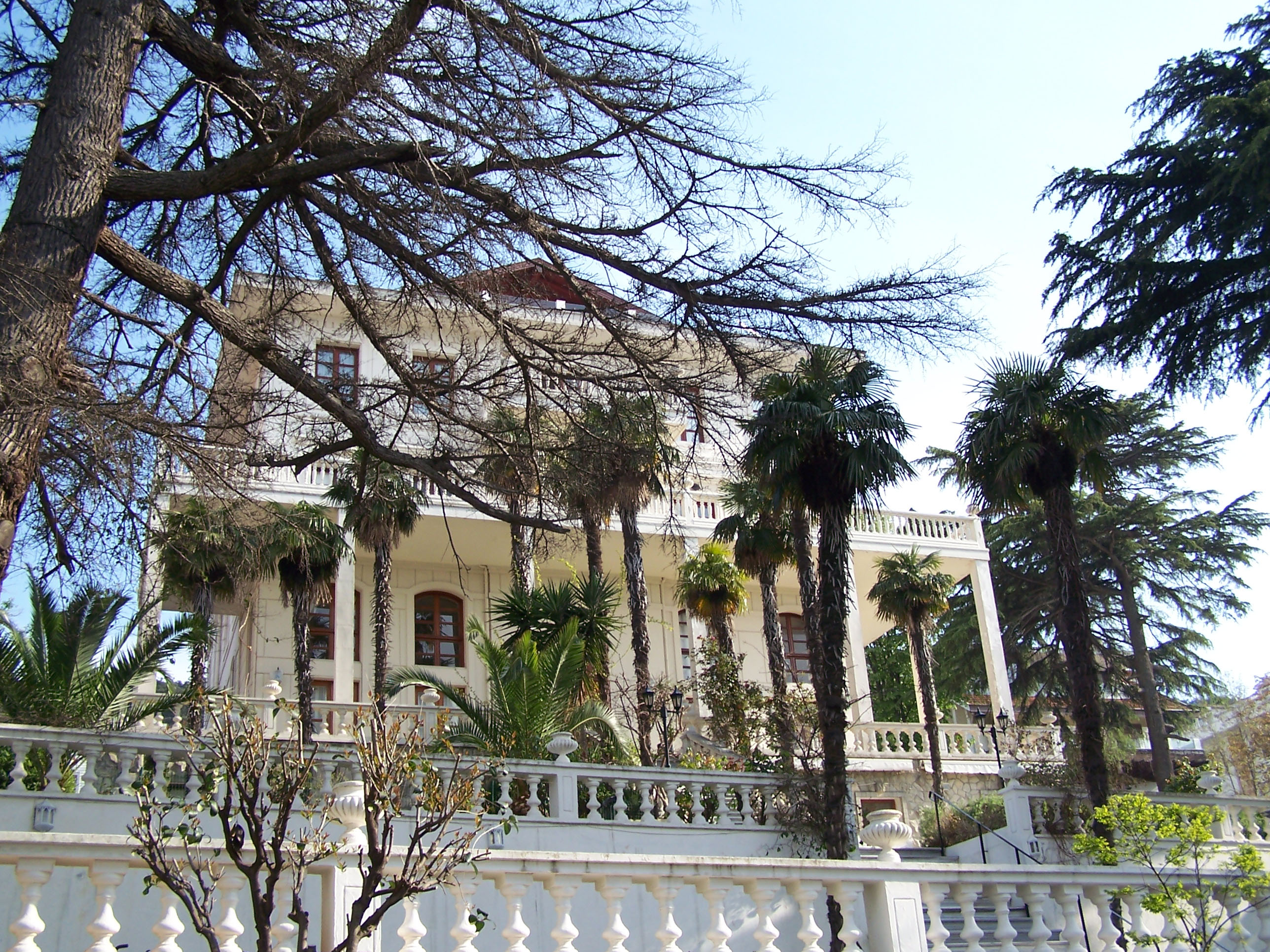 Typical house in Büyükada, Turkey